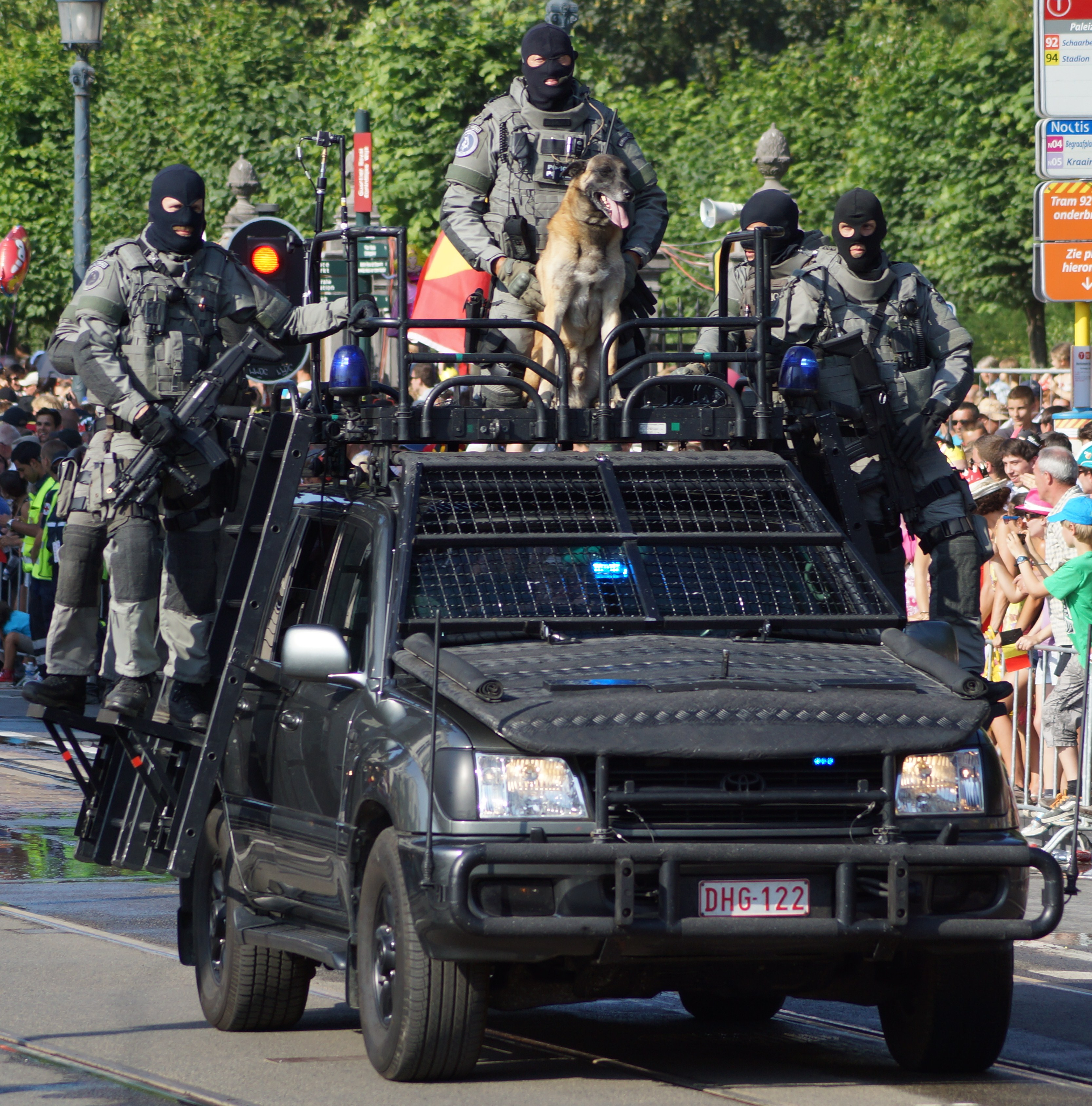 Toyota Land Cruiser du CGSU lors du défilé du 21 juillet 2013